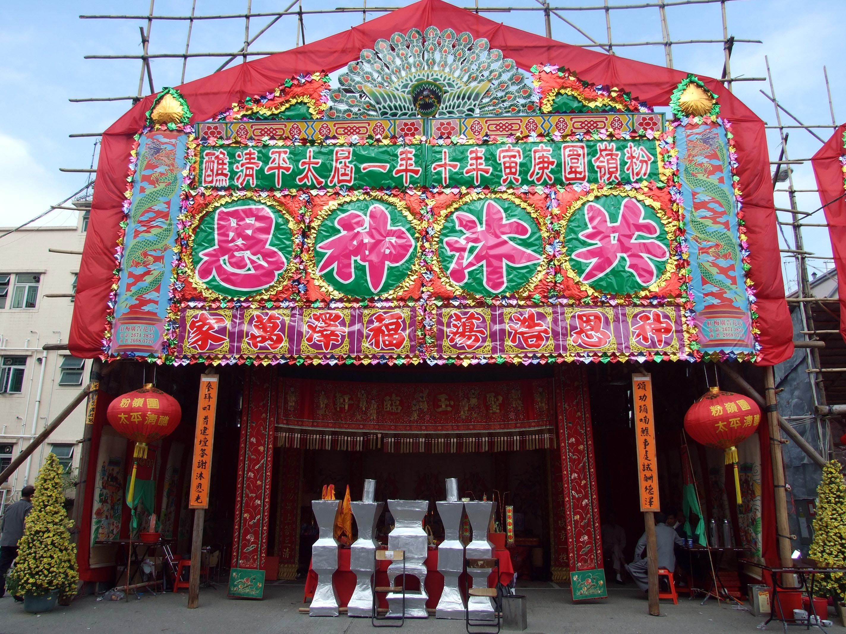 中文（香港）: 粉嶺圍庚寅年太平清醮喃嘸棚